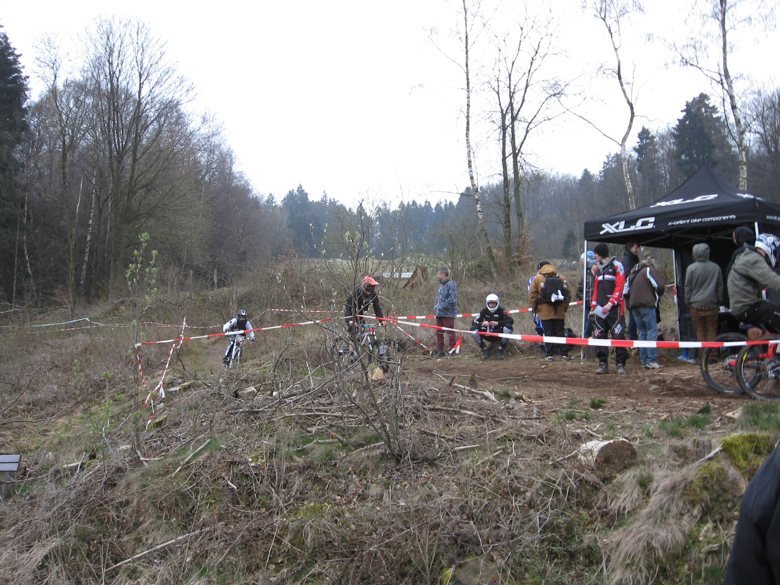 Teilansicht des Warsteiner Bikepark bei Rüthen-Kallenhardt